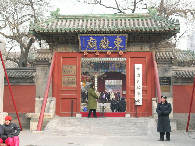 东岳庙二道门。smartneddy摄于北京东岳庙，替她传